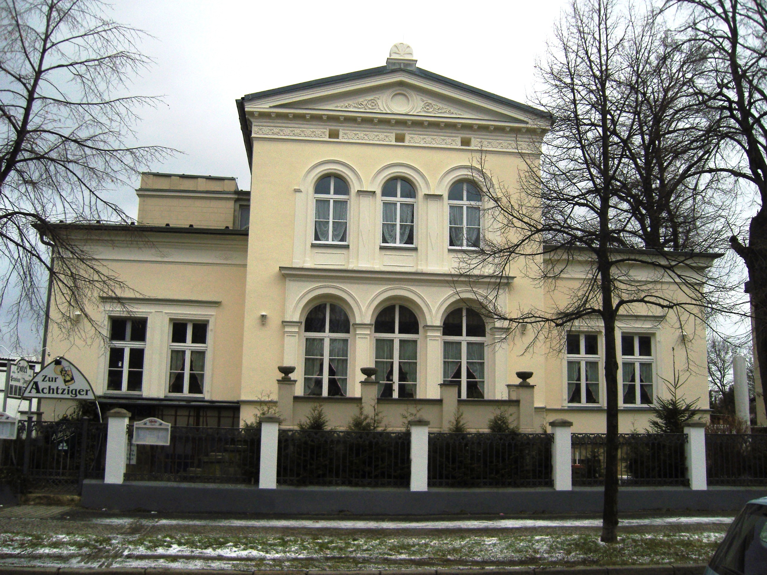 Denkmalgeschützte Villa Weberstraße 31 in Quedlinburg